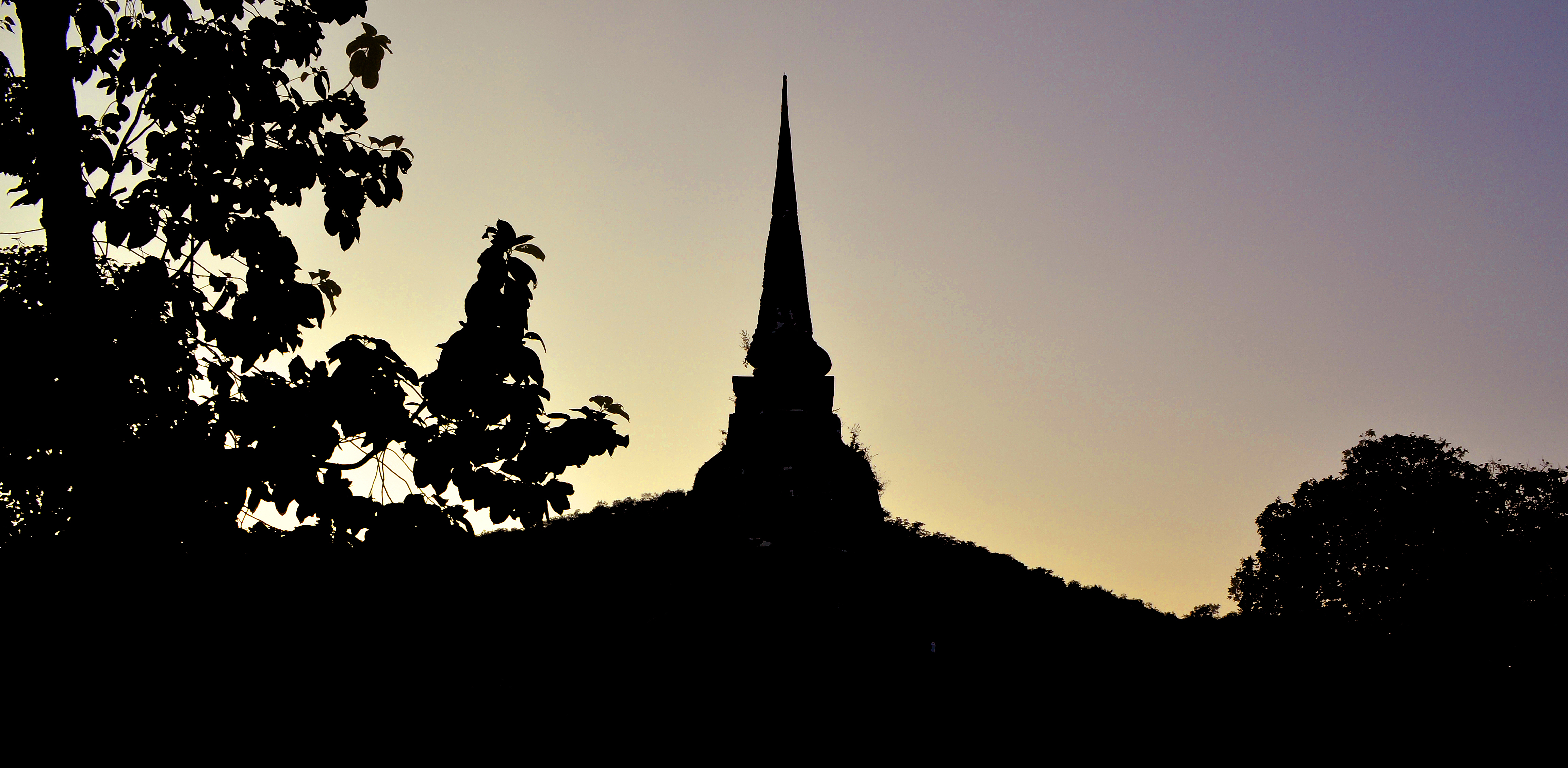 Wat Chedi Ngam im Geschichtspark Sukhothai